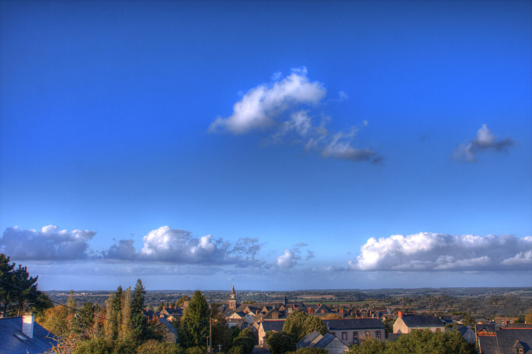 Avessac et la vallée de la Vilaine vue de Notre Dame